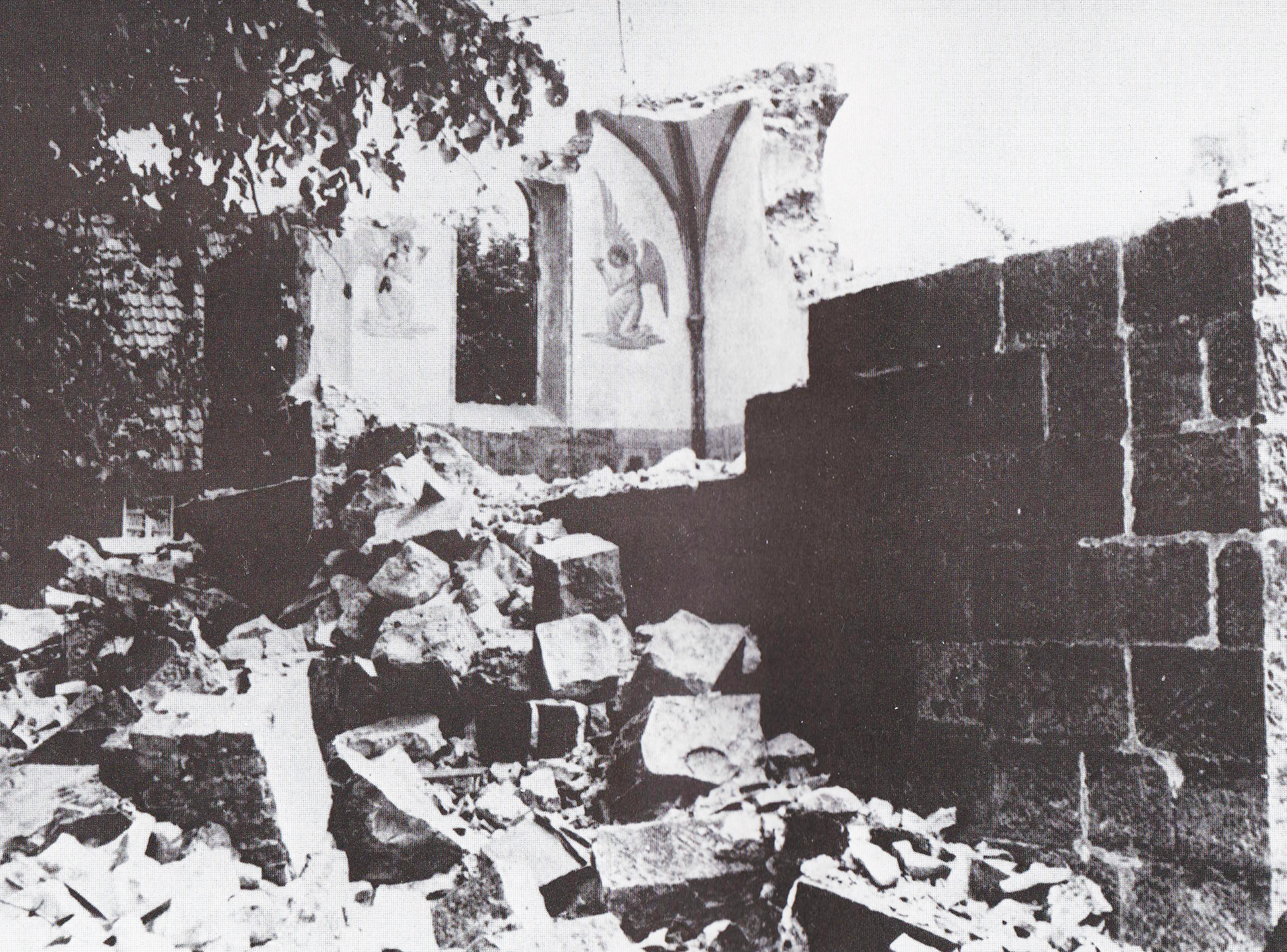 Ruine der Werler Synagoge